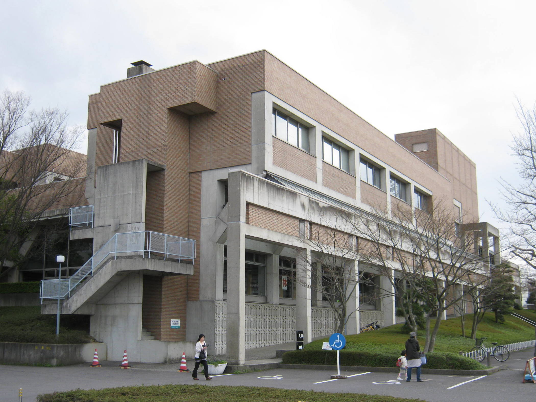 福島県郡山市の郡山市立中央図書館。